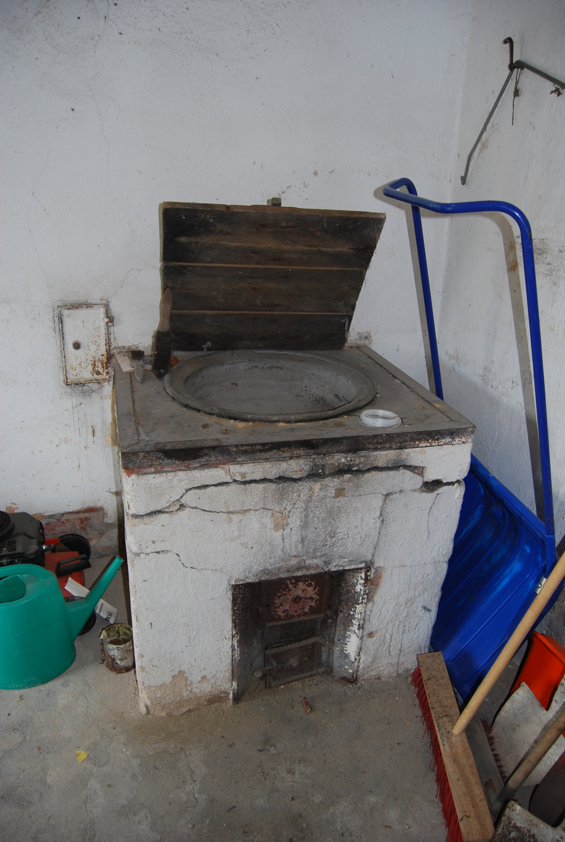 gemauerter Waschkessel mit Befeuerung